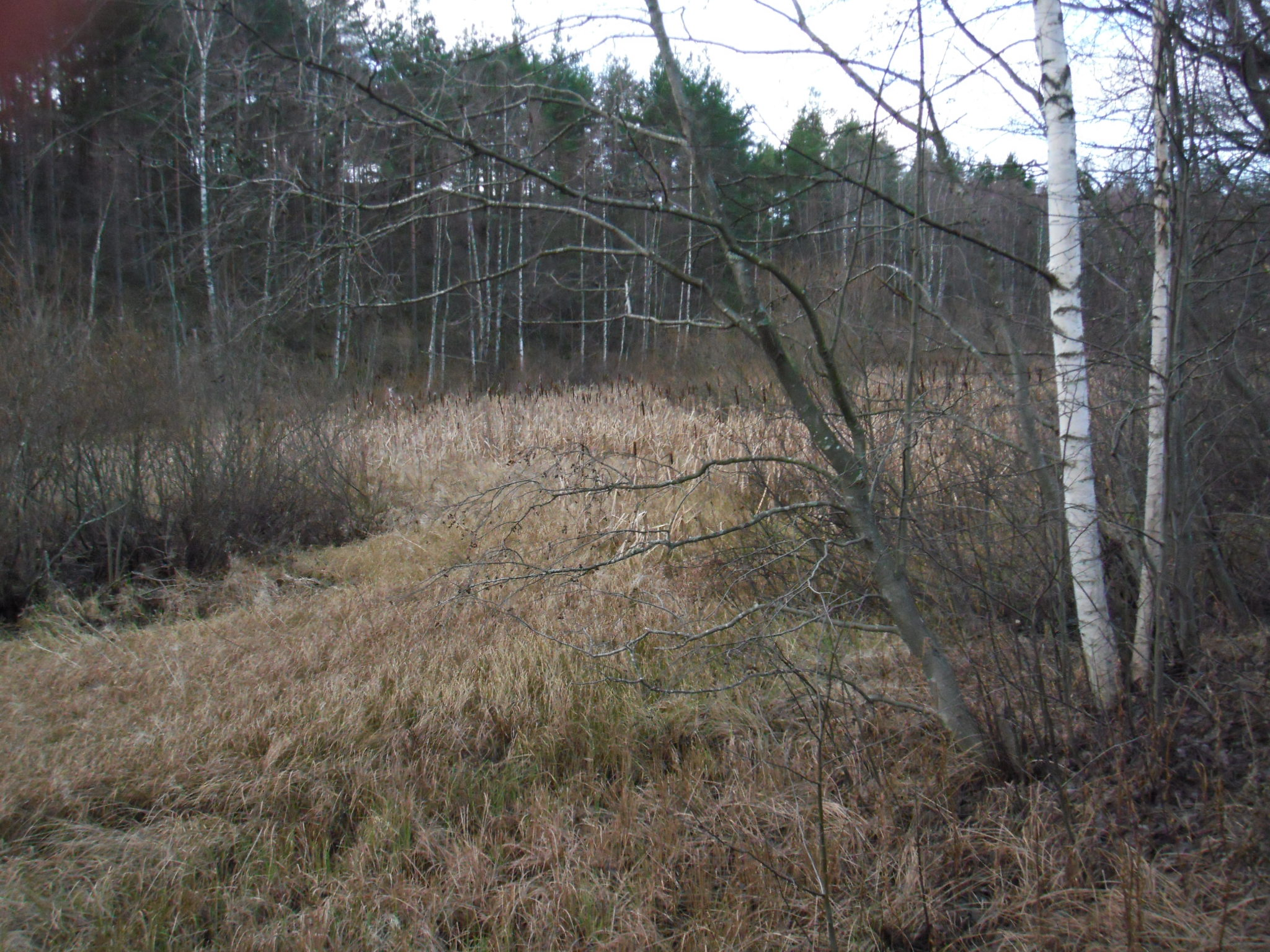 Сестрорецк на берегах Ржавой канавы